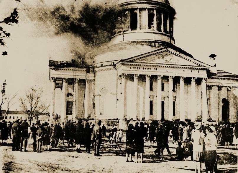 Пожар в здании б. Свято-Троицкого кафедрального собора в Симбирске